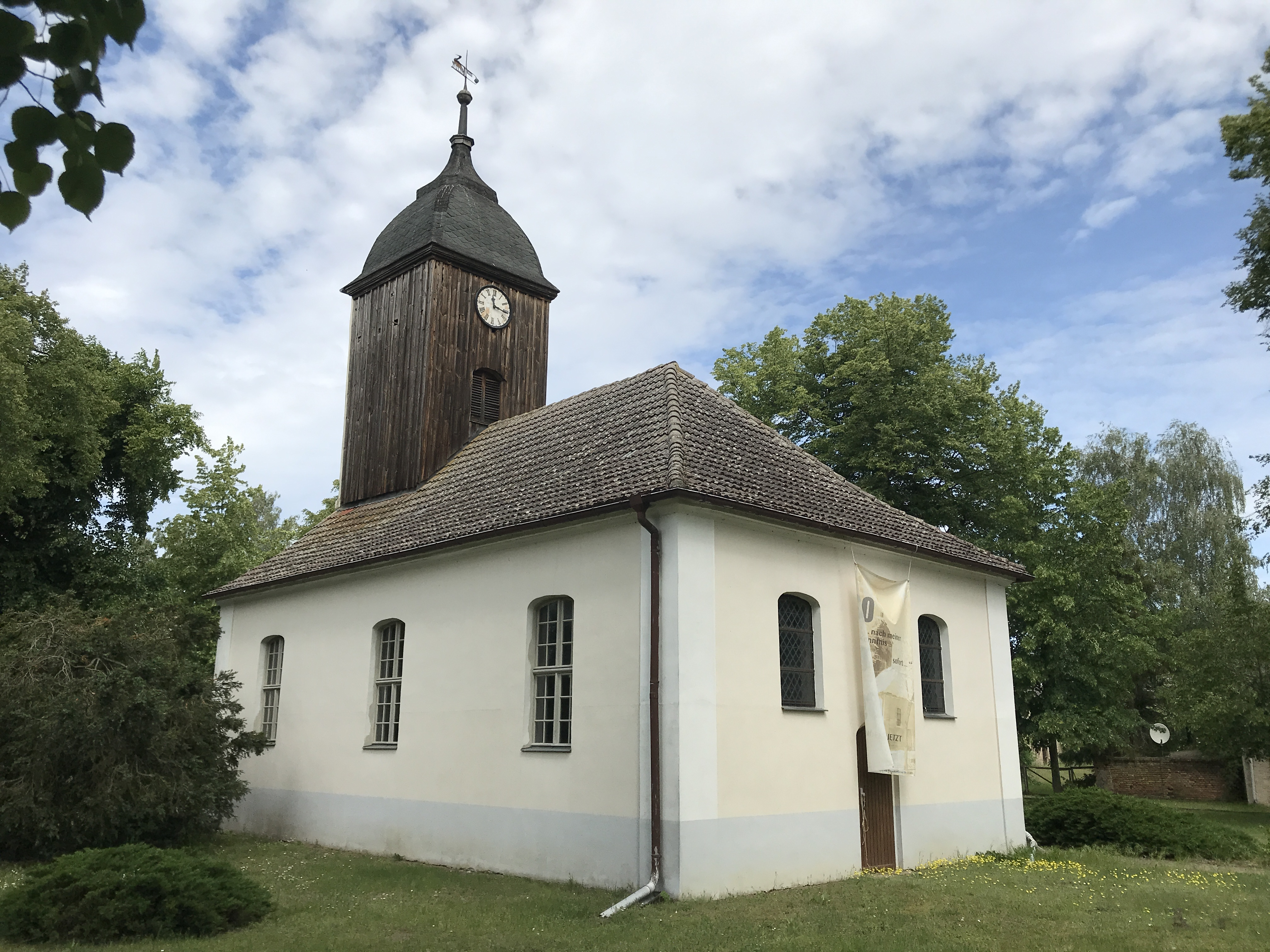 Die Dorfkirche Niebede entstand vermutlich Anfang des 18. Jahrhunderts in Niebede, einem Wohnplatz des Ortsteils Wachow der Stadt Nauen im Landkreis Havelland in Brandenburg. Die Kirchenausstattung ist teilweise älteren Datums.